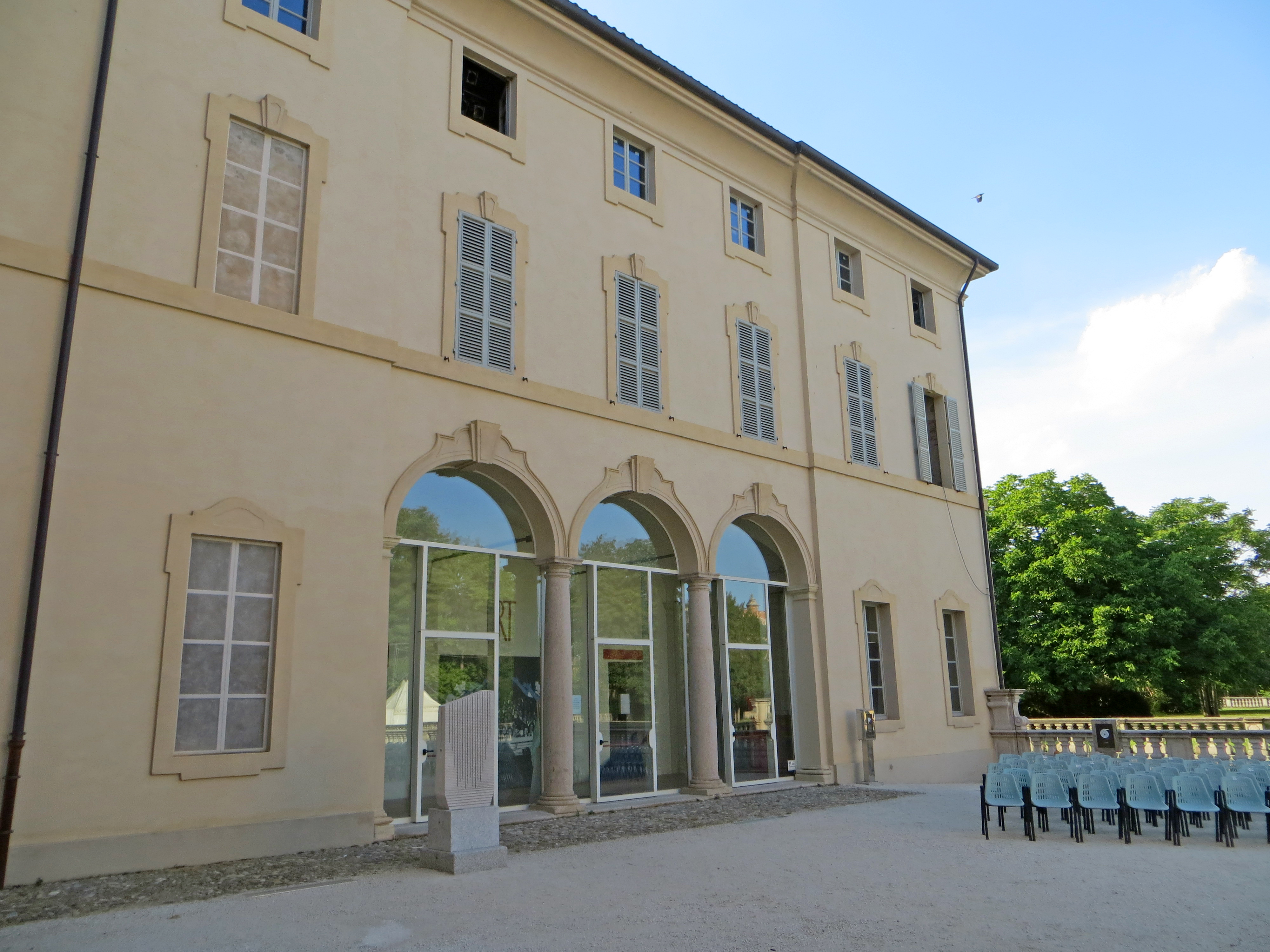 Villa Pallavicino (Busseto) - ala ovest del Palazzo delle Scuderie This is a photo of a monument which is part of cultural heritage of Italy.